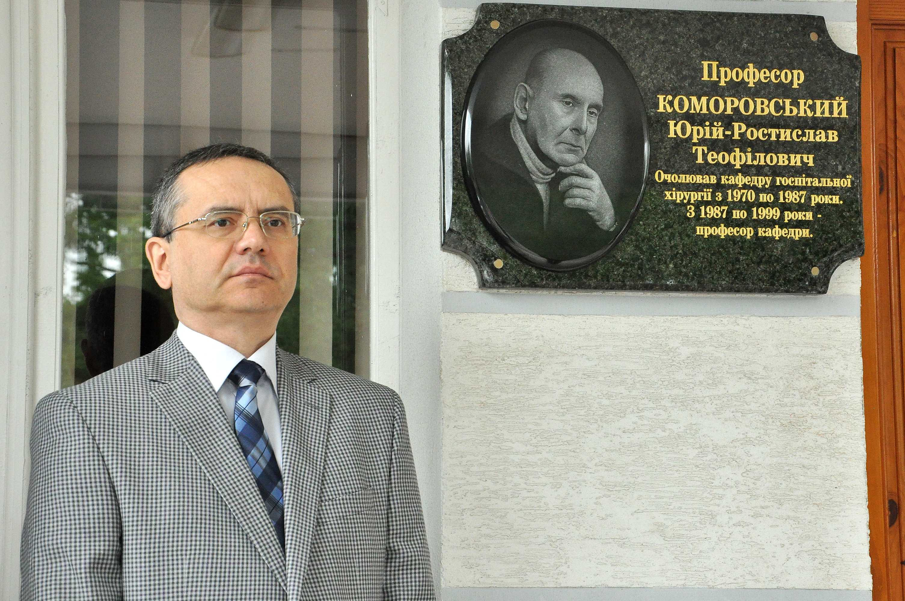 Відкриття дошки професору Ростиславові-Юрію Коморовському на фасаді терапевтичного корпусу № 1 Тернопільської університетської лікарні. Ректор Тернопільського державного медичного університету імені І. Я. Горбачевського професор Михайло Корда.